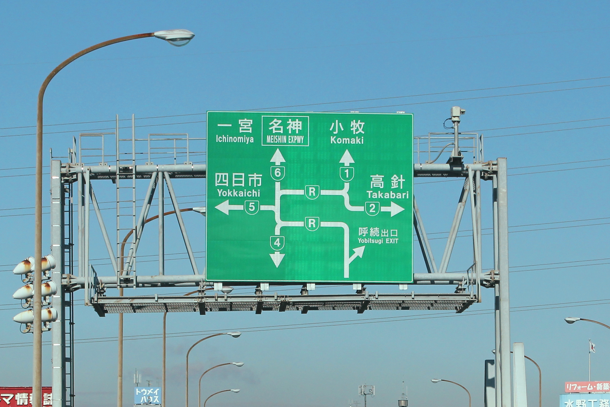 名古屋高速3号大高線（北行）の案内標識